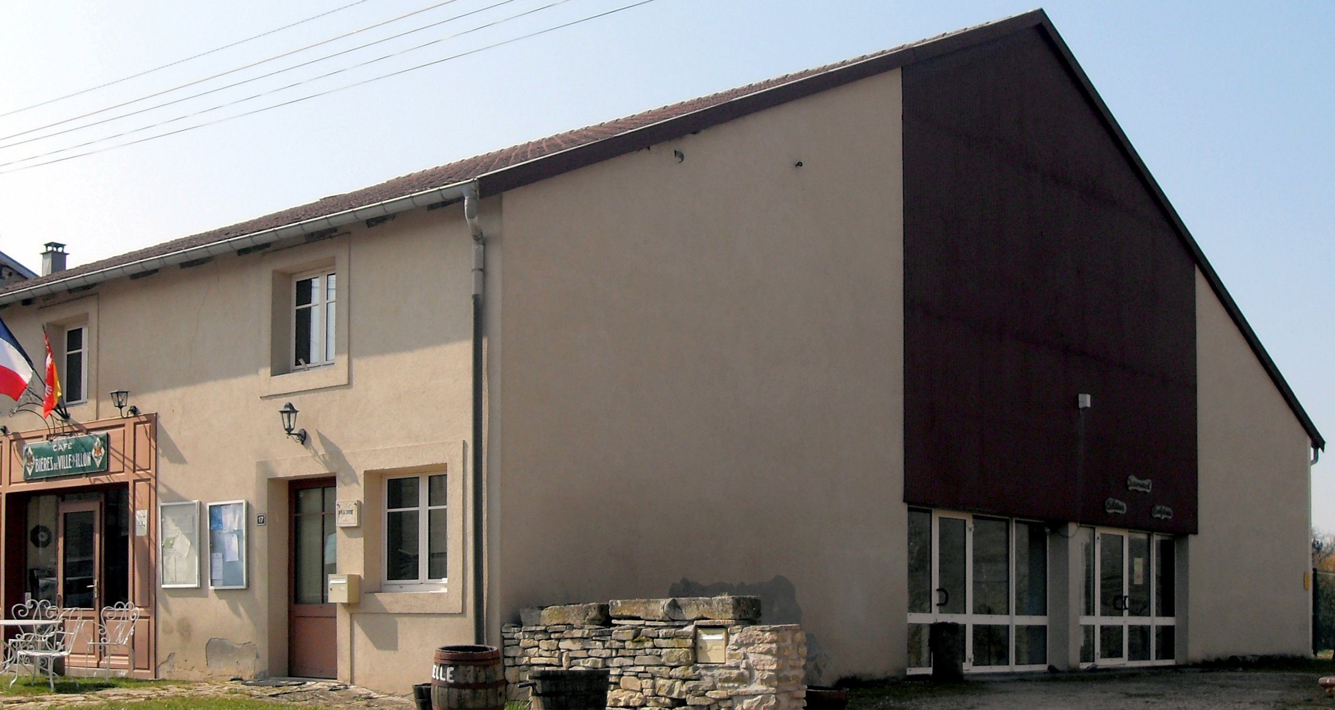 La mairie de Xaronval